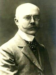 Porträt des Monschauer Landrates Friedrich von Kesseler